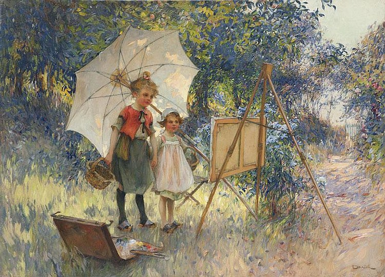 Enfants au jardin contemplant le tableau du père